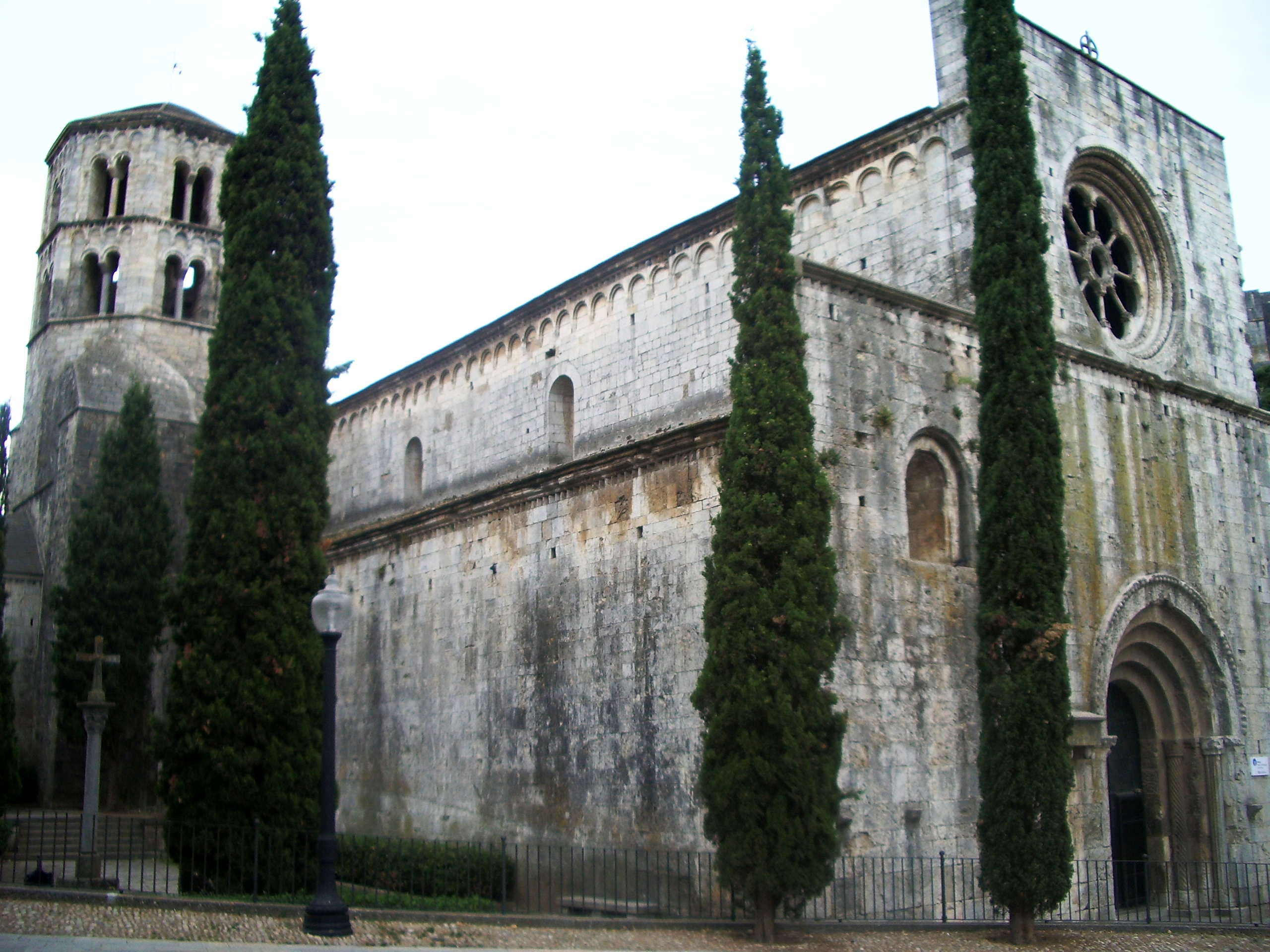 Monasterio de San Pere de Galligans